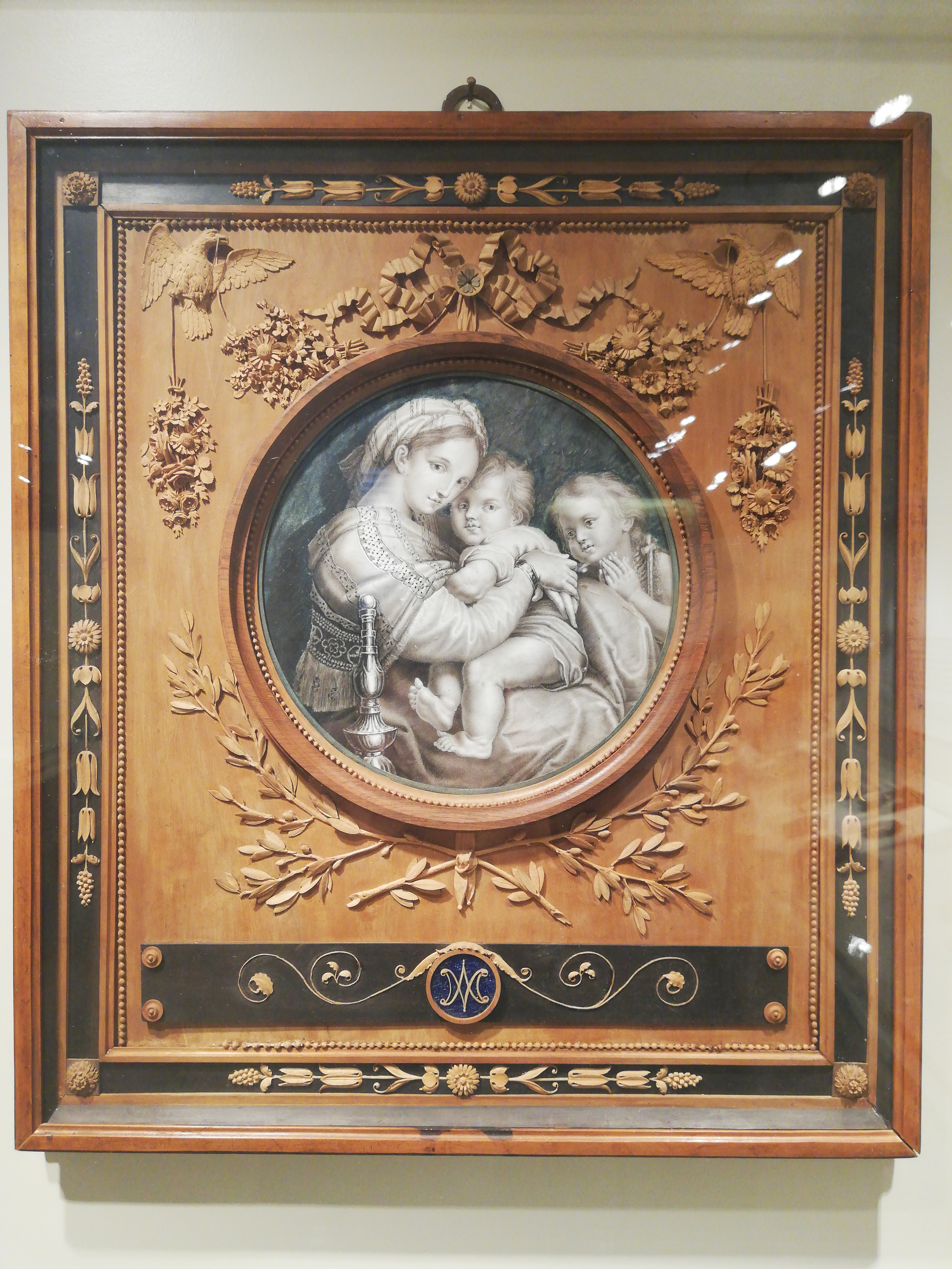 Palazzo Mazzetti, 1808, Giuseppe Maria Bonzanigo e Angelo Vacca jr?